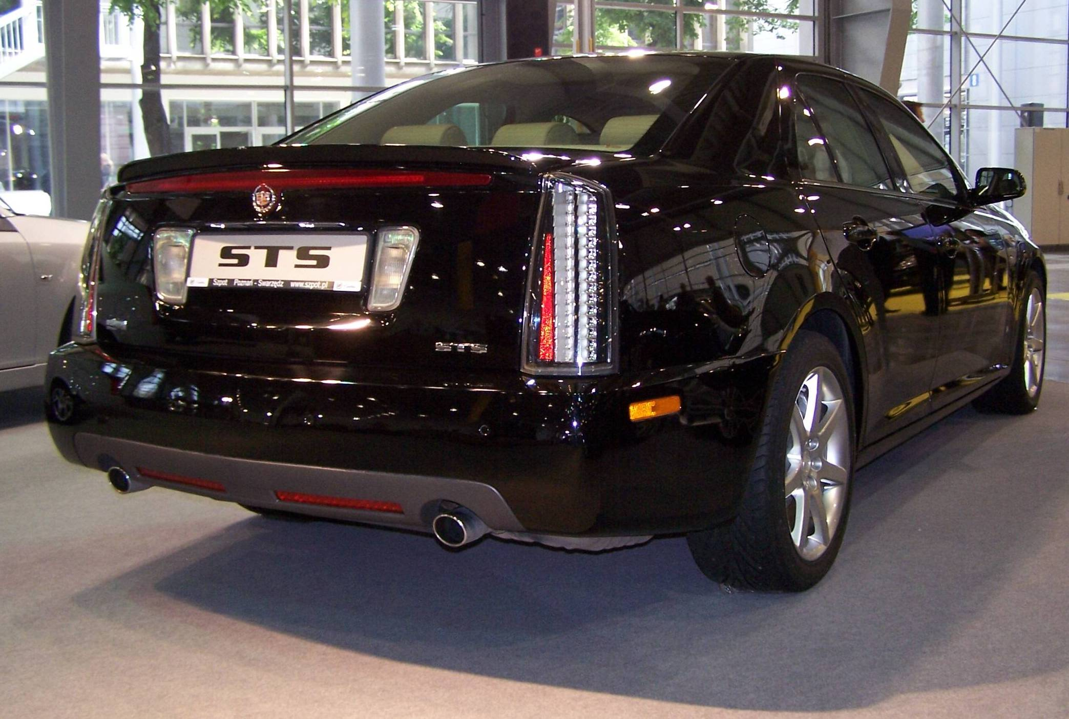 Cadillac STS at Poznań Motor Show